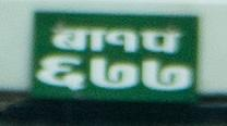 Зображення номерного знаку